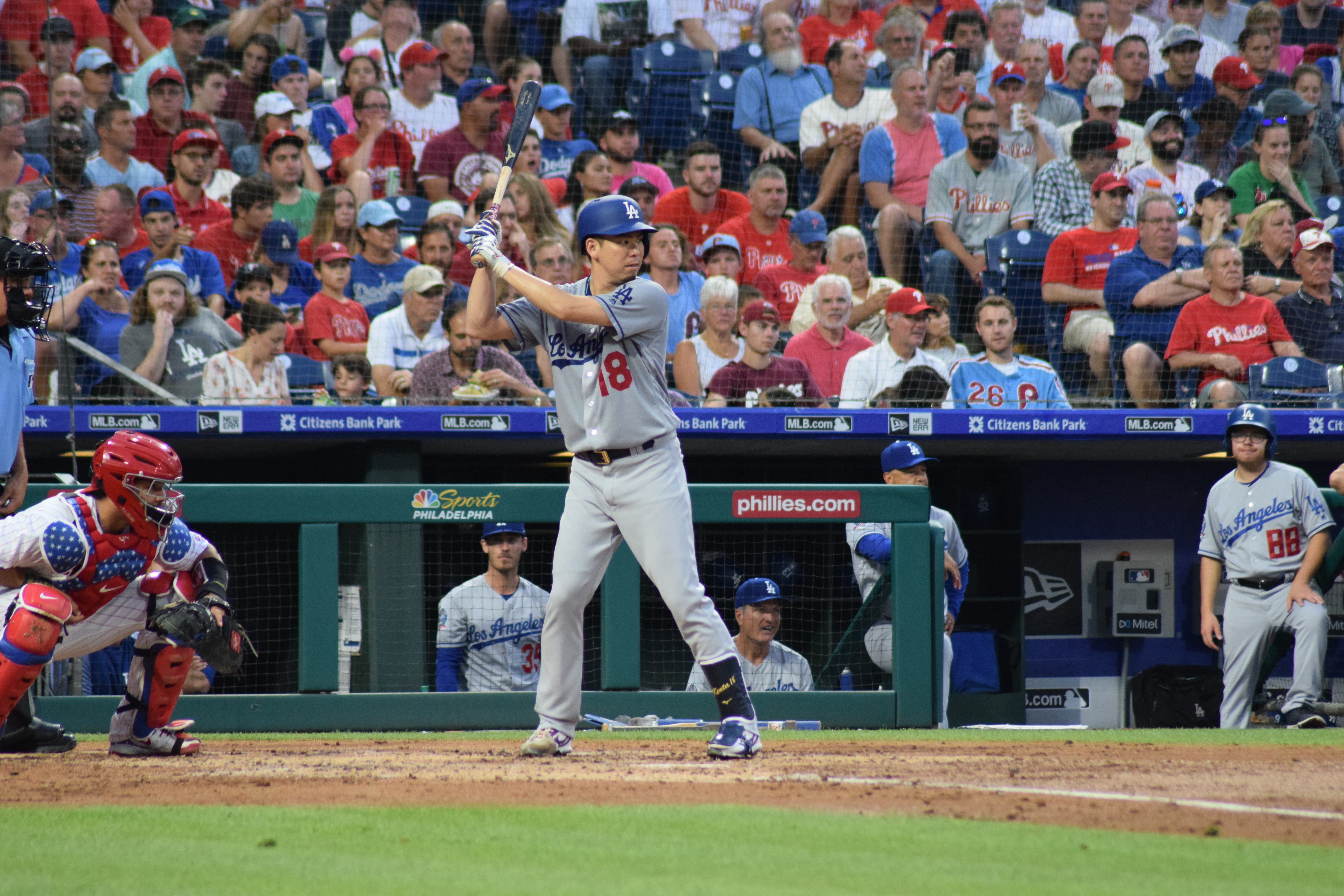 Kenta Maeda